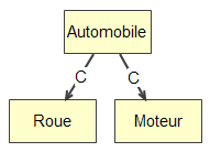 Mot composition de concepts